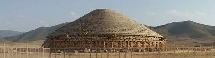 Le medracen, tombeau Numide (-300 avant J-C)